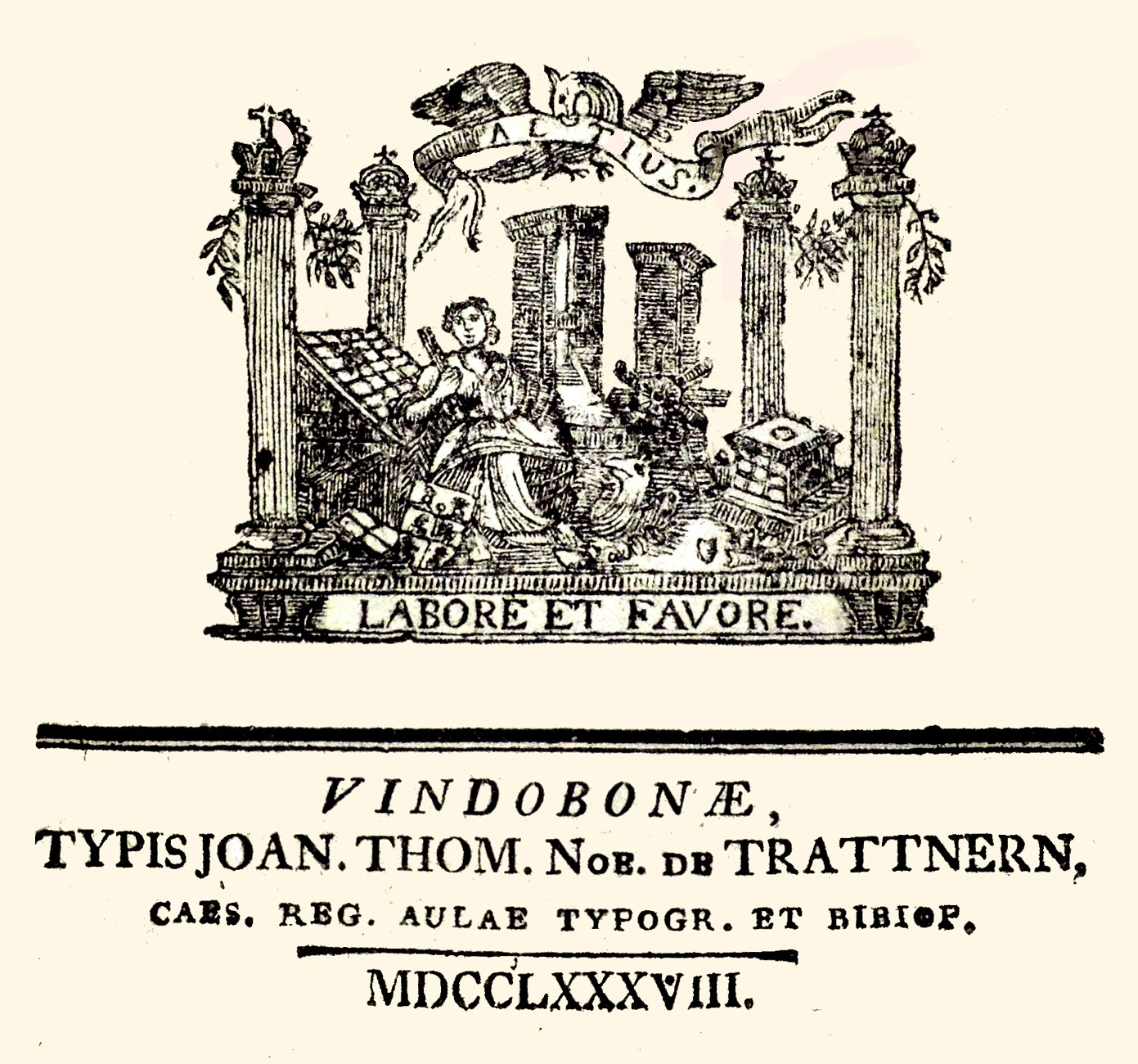 Joan. Thom. Noe de Trattnern, Verlagszeichen mit Leitspruch „Altius labore et favore“ Wien, 1788 (aus Buch: Institutiones Ad Eloquentiam)